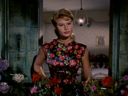 Italian actress Marisa Allasio in the film Venezia, la luna e tu